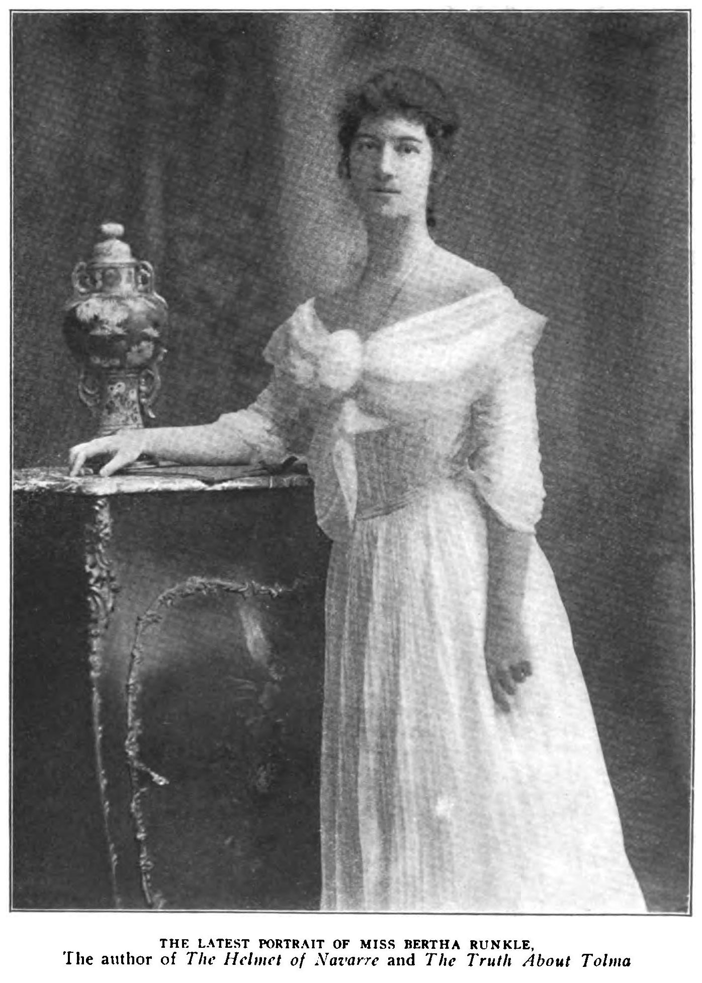 Bertha Runkle